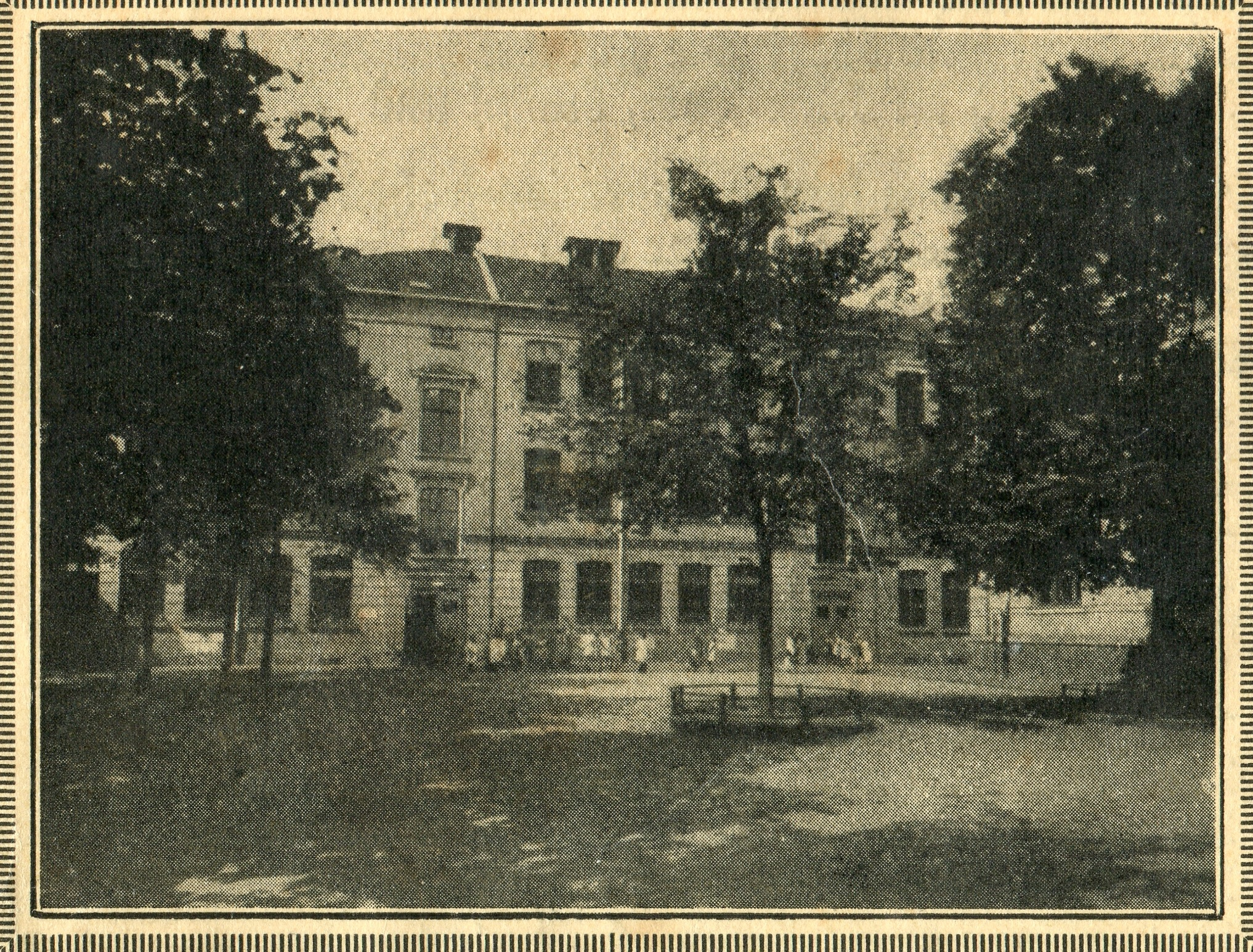 51. Volksschule Leipzig-Kleinzschocher 1926, Festschrift 50jähriges Jubiläum